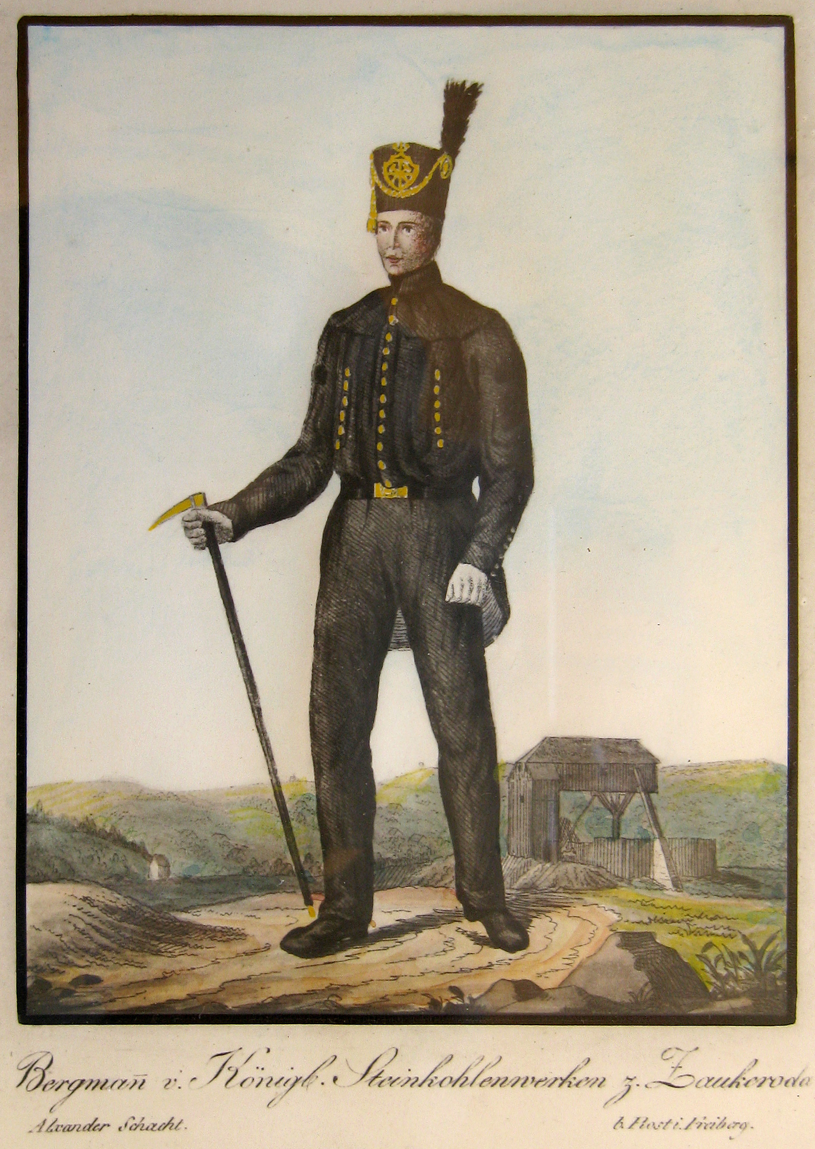 Arbeiter am Königlichen Steinkohlenwerk Zauckerode im Paradeanzug um 1850